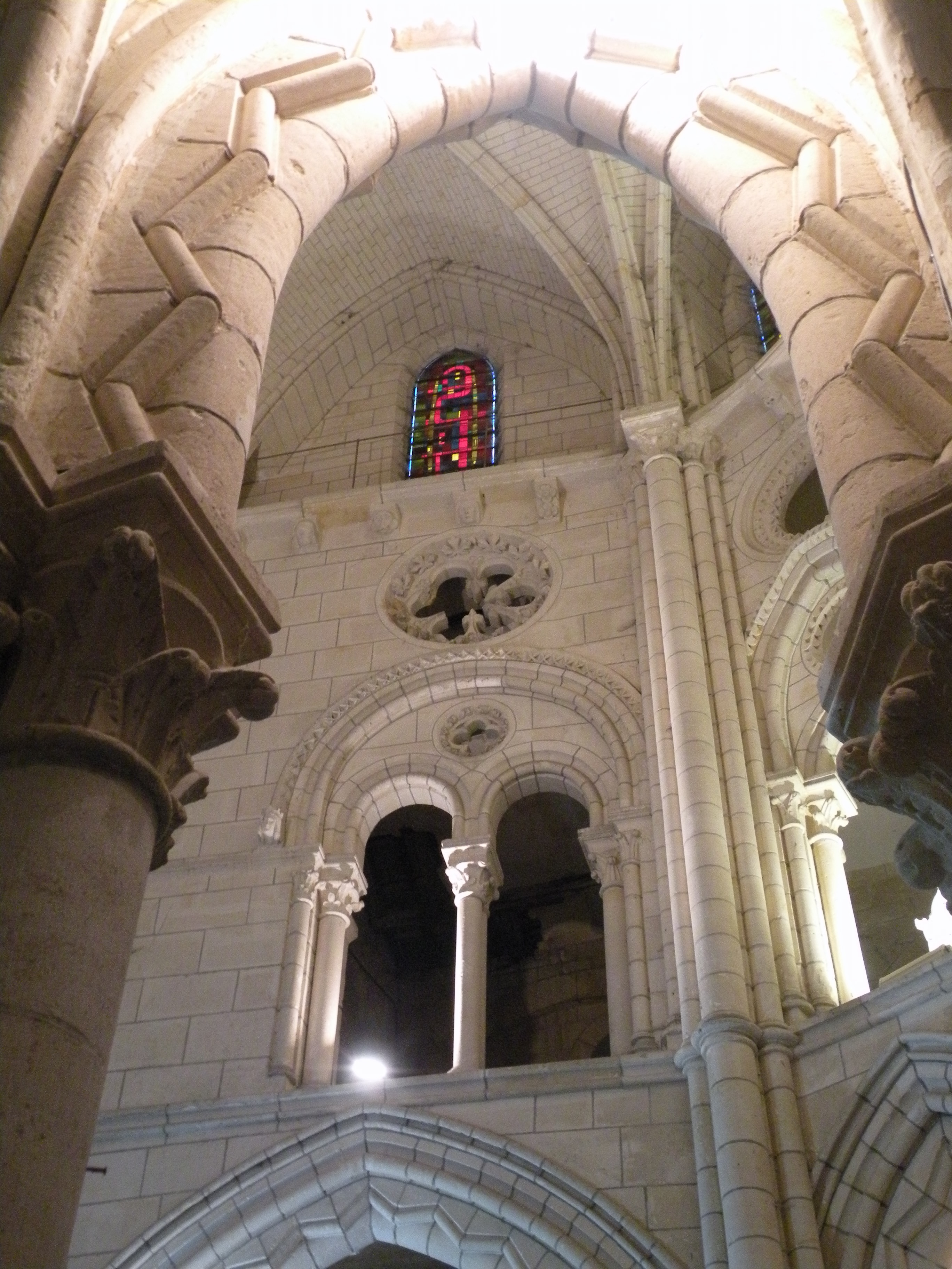 détail du choeur